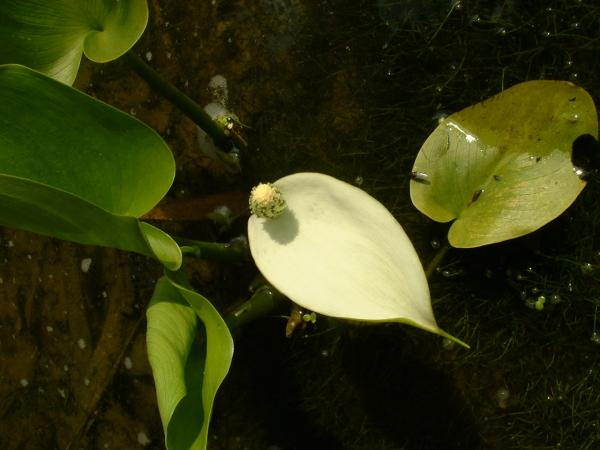 Calla palustris, photo J.F. Gaffard, Acorus (jardin aquatique) Autoreille, mai 2004, licence GFDL J.F. Gaffard mai 2004